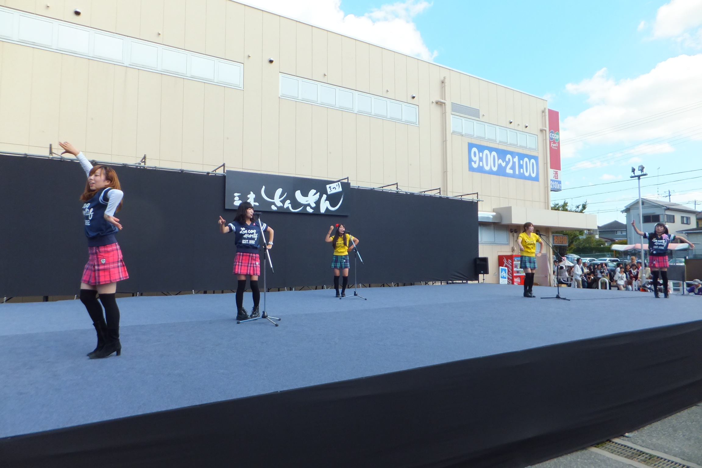 2013年三木さんさんまつり